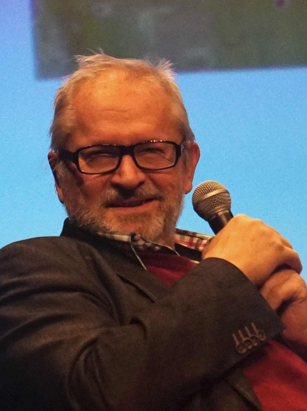 lors du 44e festival international de la Bande Dessinée.